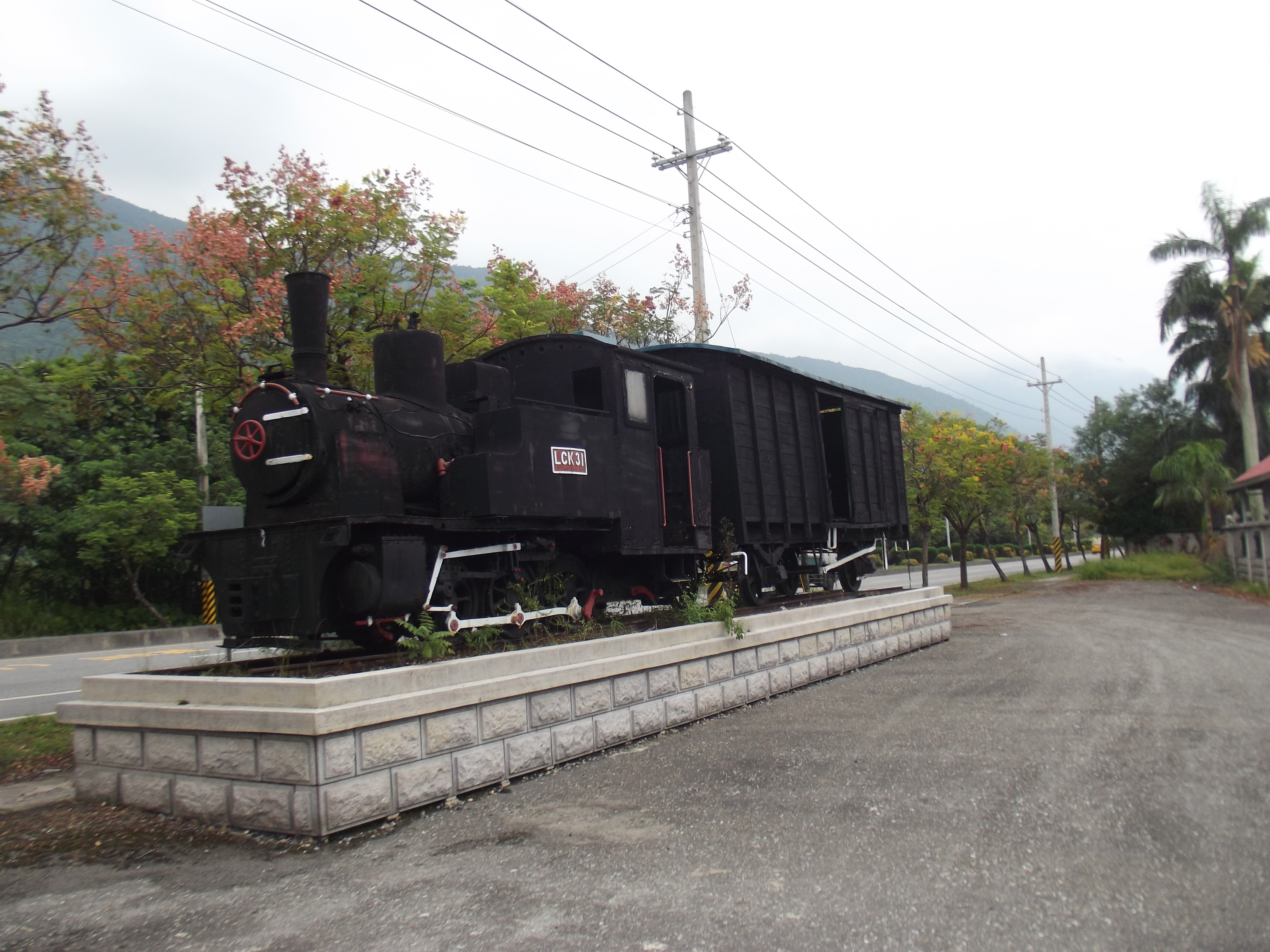 Klein spoormuseum langs de hoofdweg in Xincheng, Taiwan